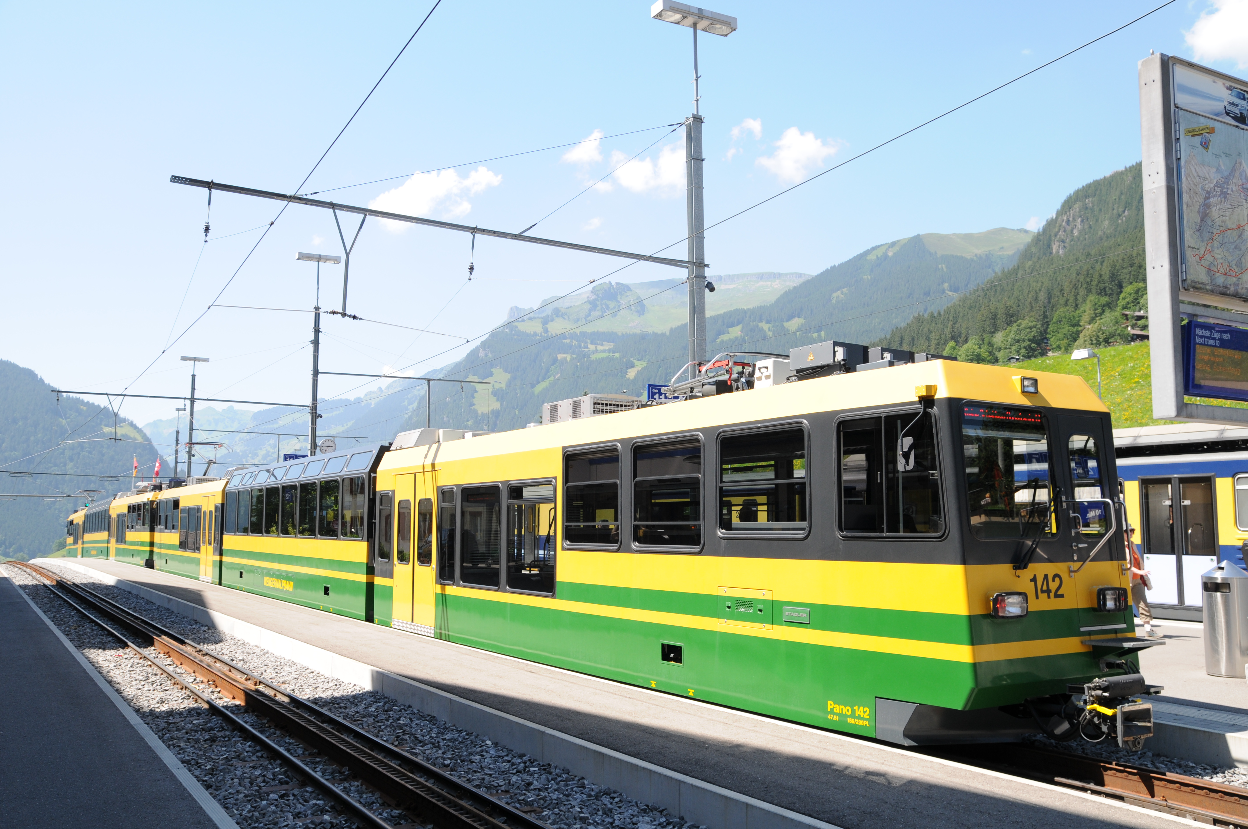 Berner Oberland.